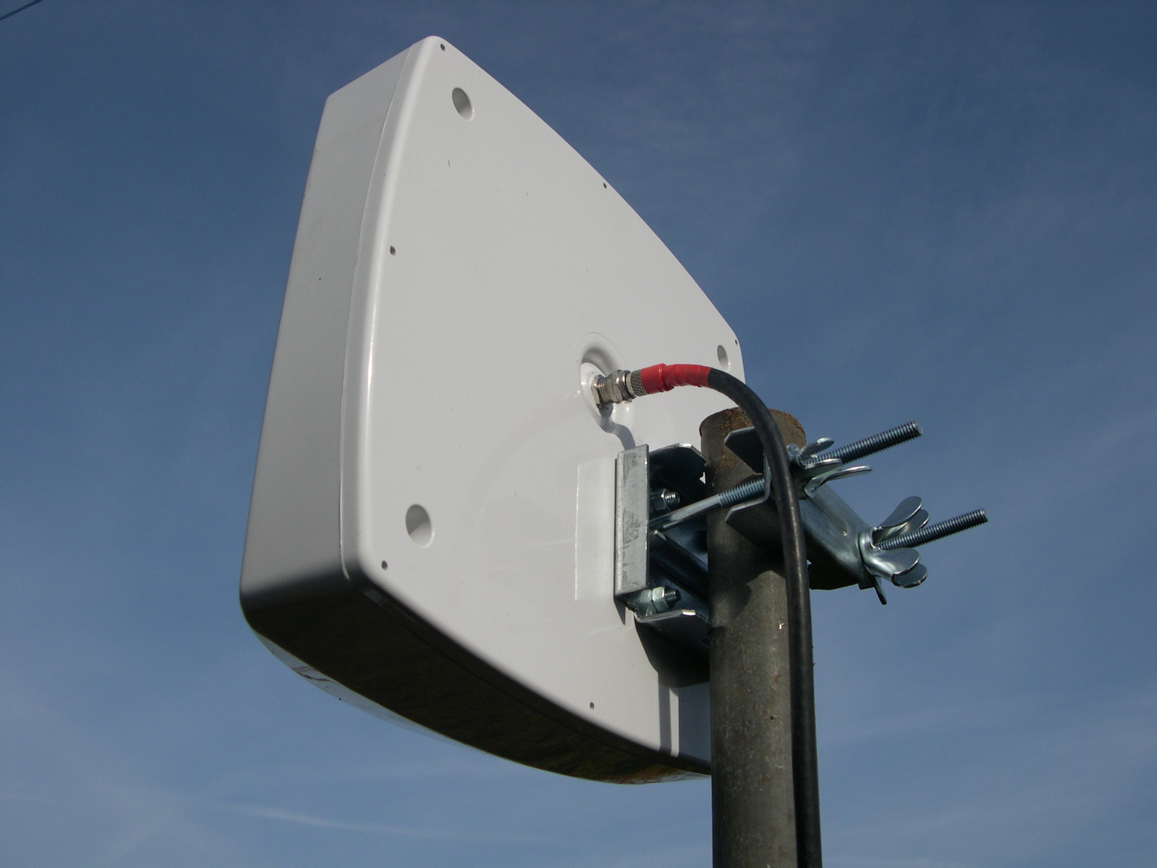 Antenne type compacte UHF -21/69 - pour la réception de la TV en mode, notamment, TNT. Deux versions sont commercialialisées antenne passive ou active( préampli intégré). Existe aussi une version VHF-UHF preamplifiée ou pas.